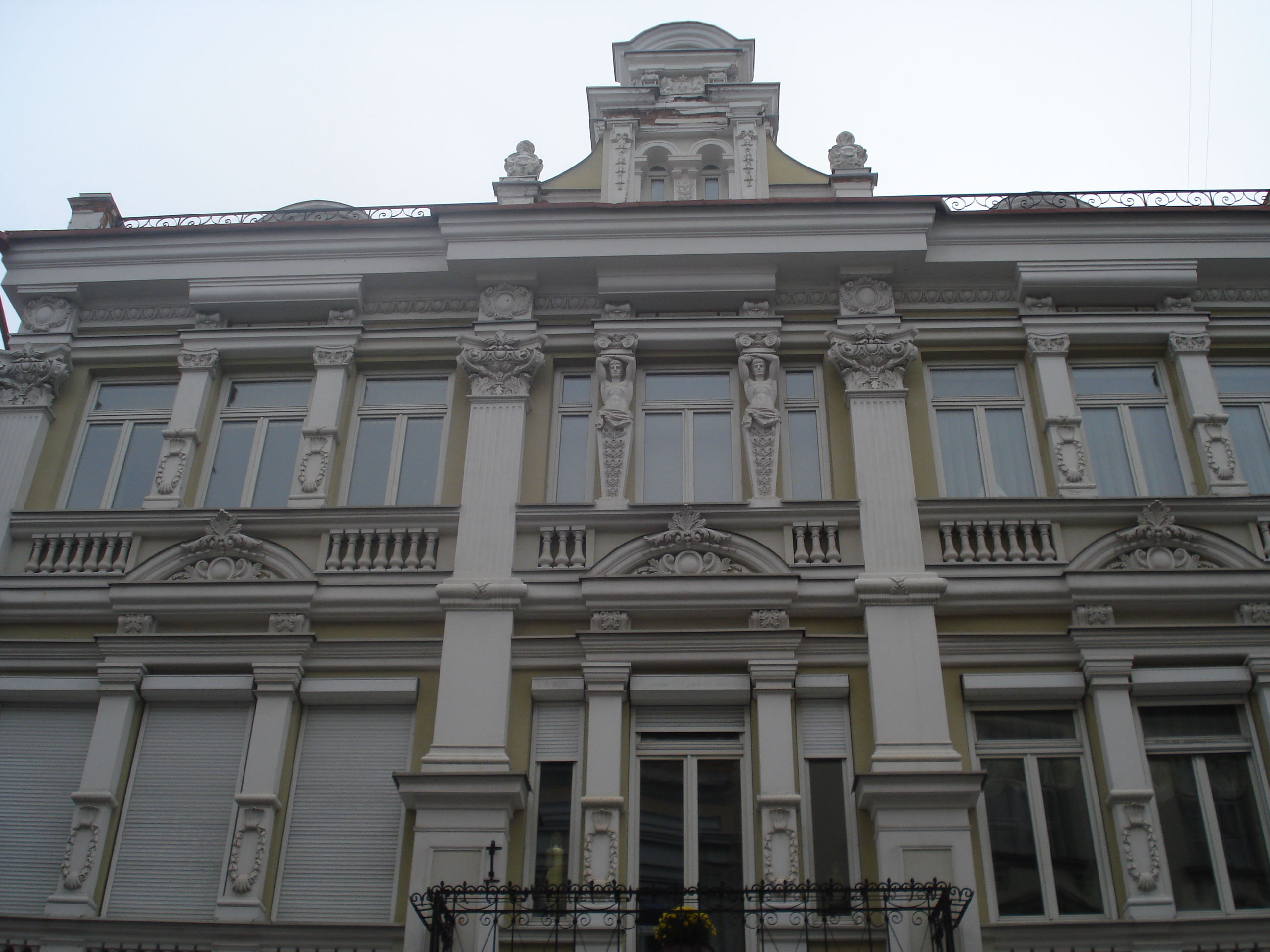 Didžioji street 10 in Vilnius. Detail